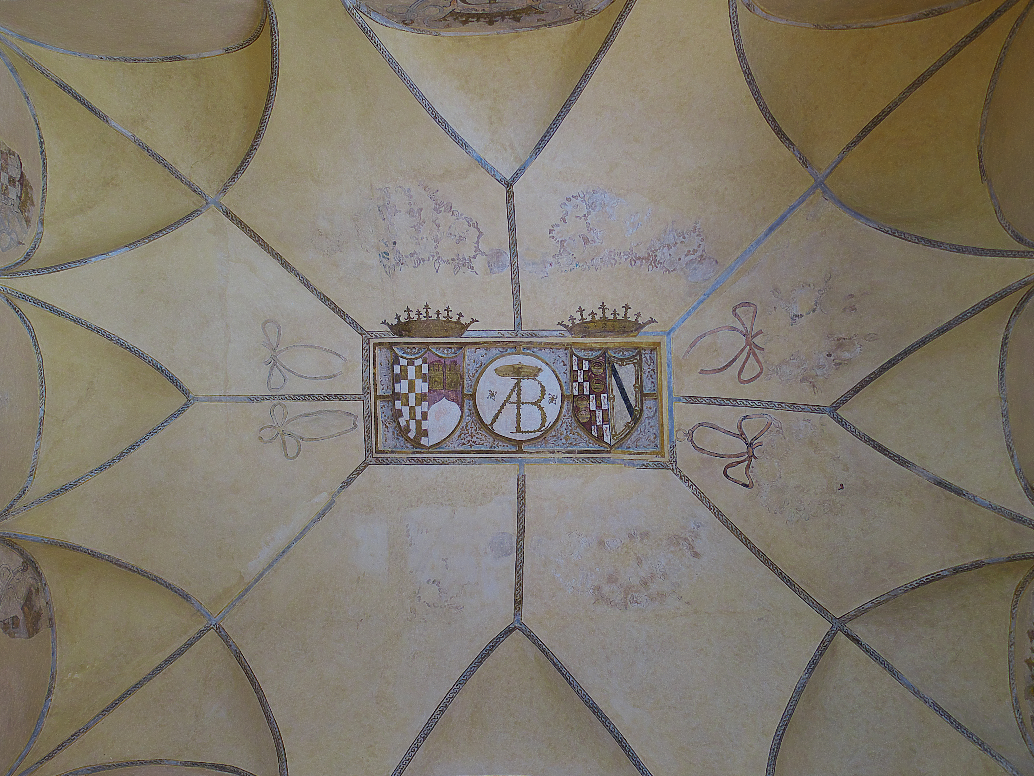 Felipe II concede el Marquesado de Villamanrique (1575) a Álvaro Manrique de Zúñiga y Sotomayor (1525-1604) casado con Blanca Enríquez de Almansa y Velasco.